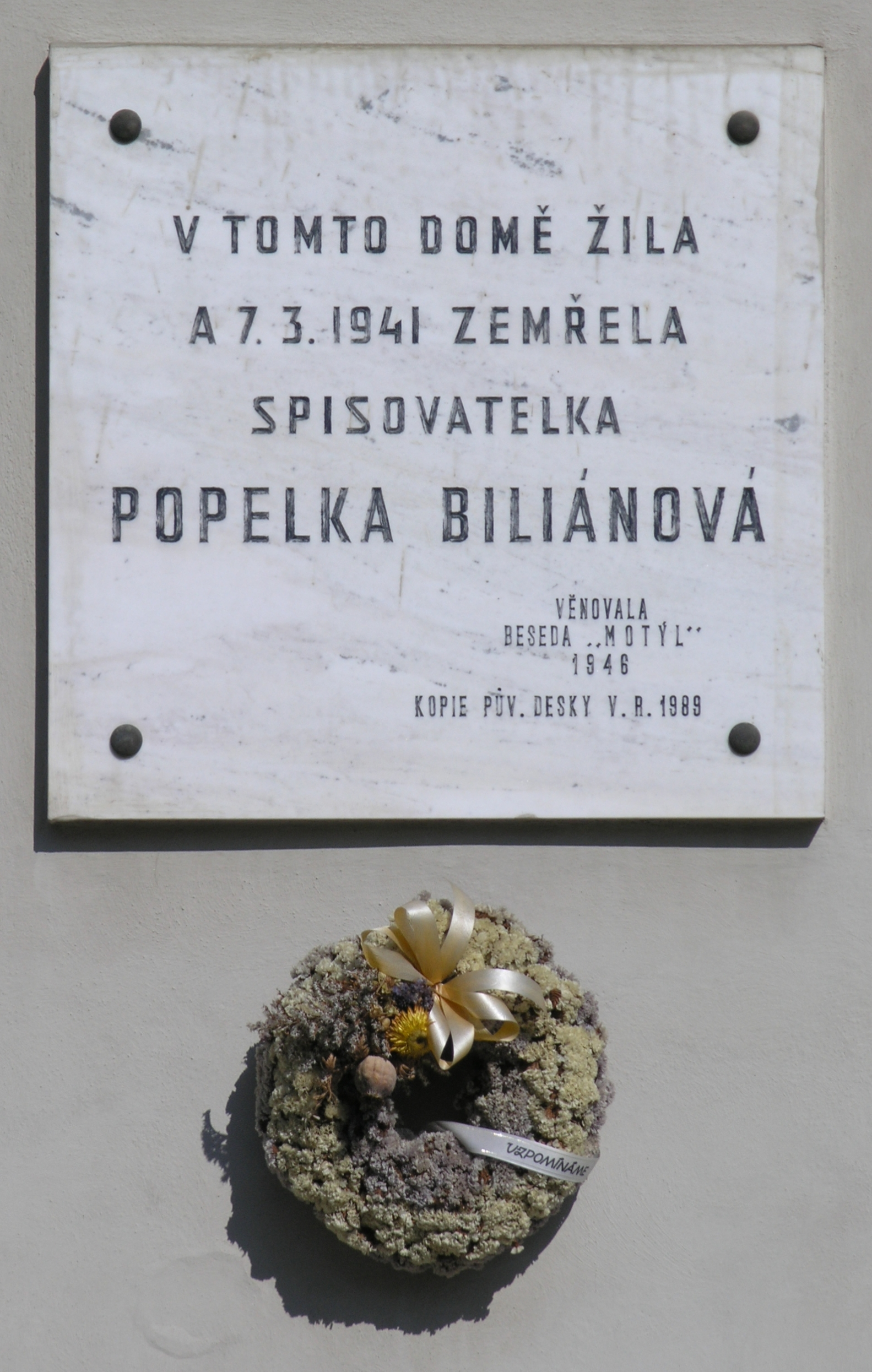 Praha, Vyšehrad